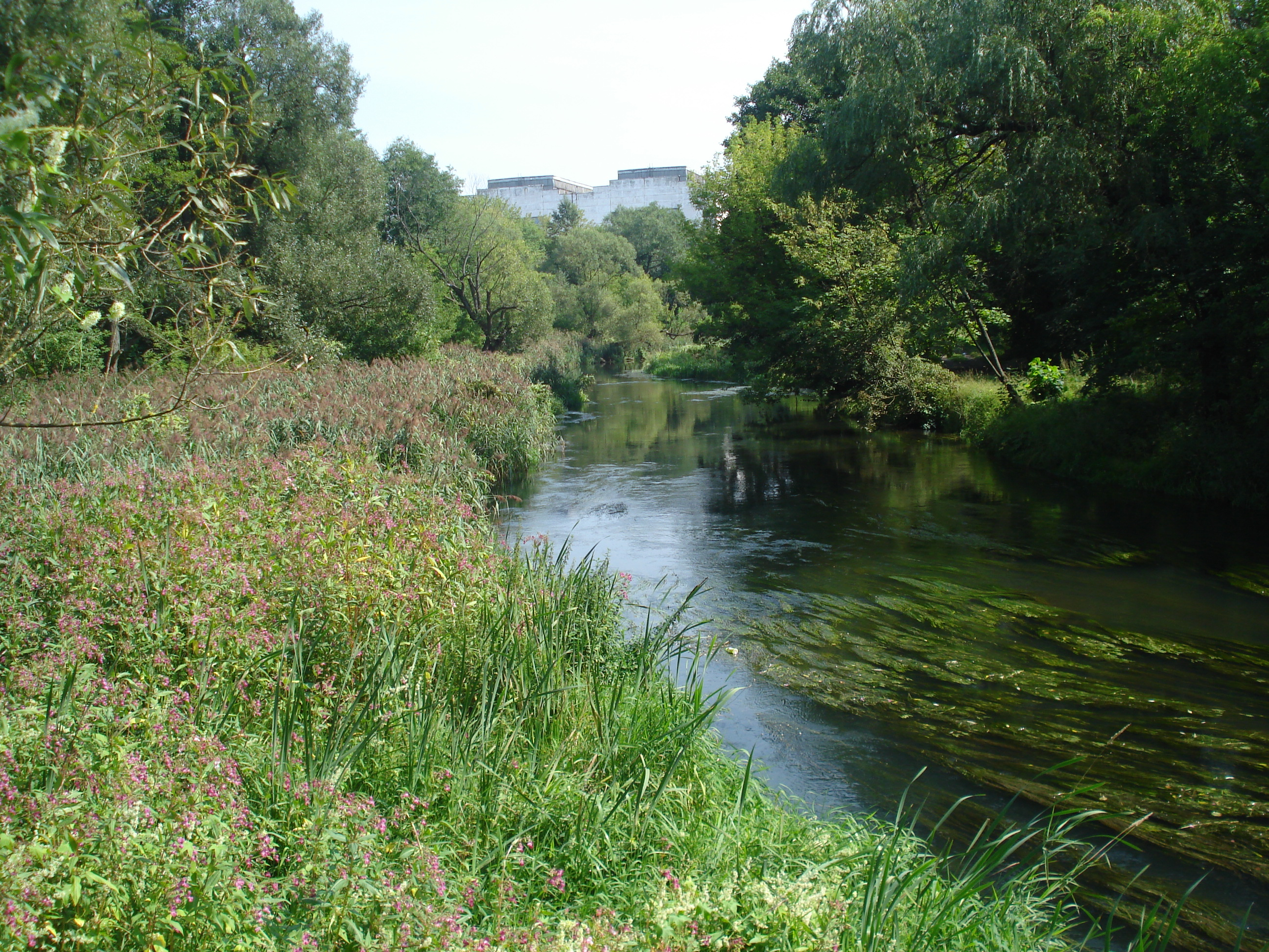 Vilnia river in Naujoji Vilnia, Lithuania